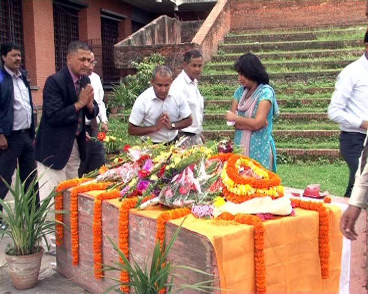 नेपाली: राममान तृषितको शव